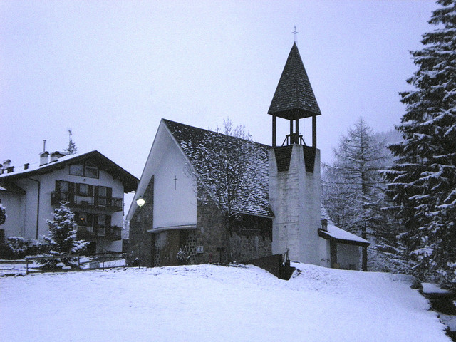 Chiesa di Stramentizzo, Trento, Italia, nel Pasqua 2008.